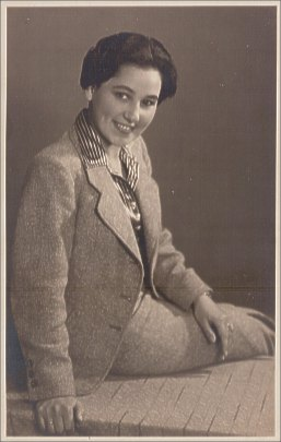 Duitse verpleegster die een gewonde officier verzorgt.